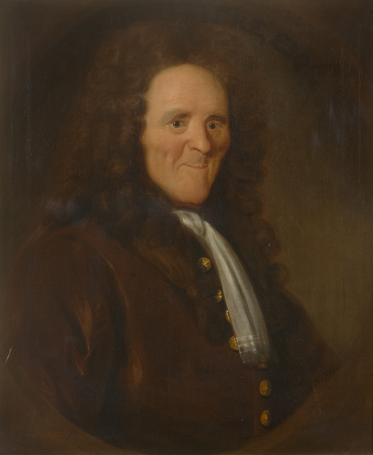 Portrait of Paul Buissière FRS (died 1739), French surgeon.